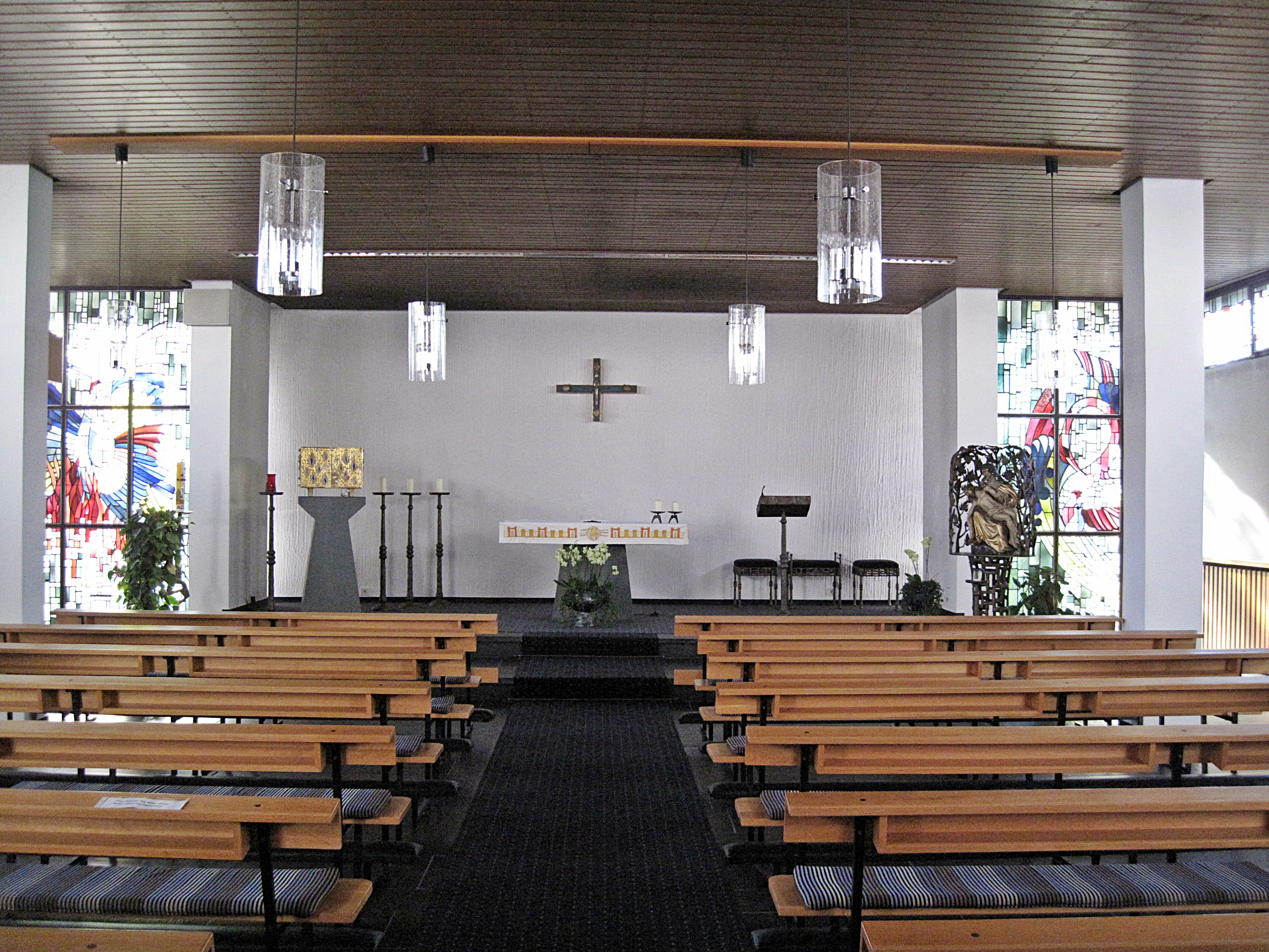 Brilon, Krankenhaus, Kapelle, Blick auf den Altar